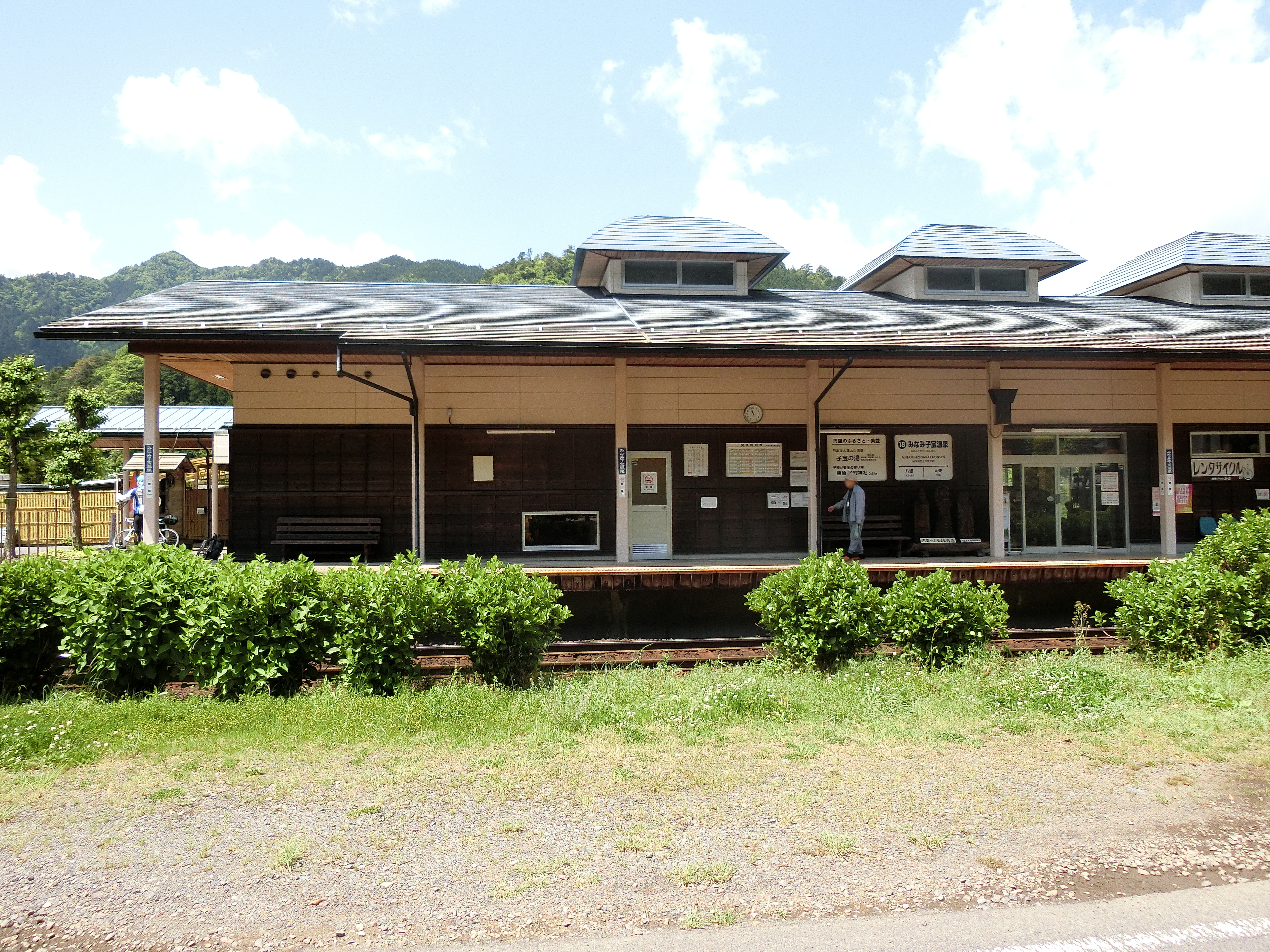 みなみ子宝温泉駅（ホーム側から）